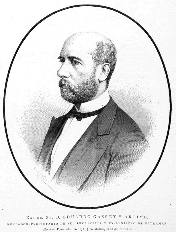 Retrato de Eduardo Gasset y Artime, publicado en la revista española La Ilustración Española y Americana.